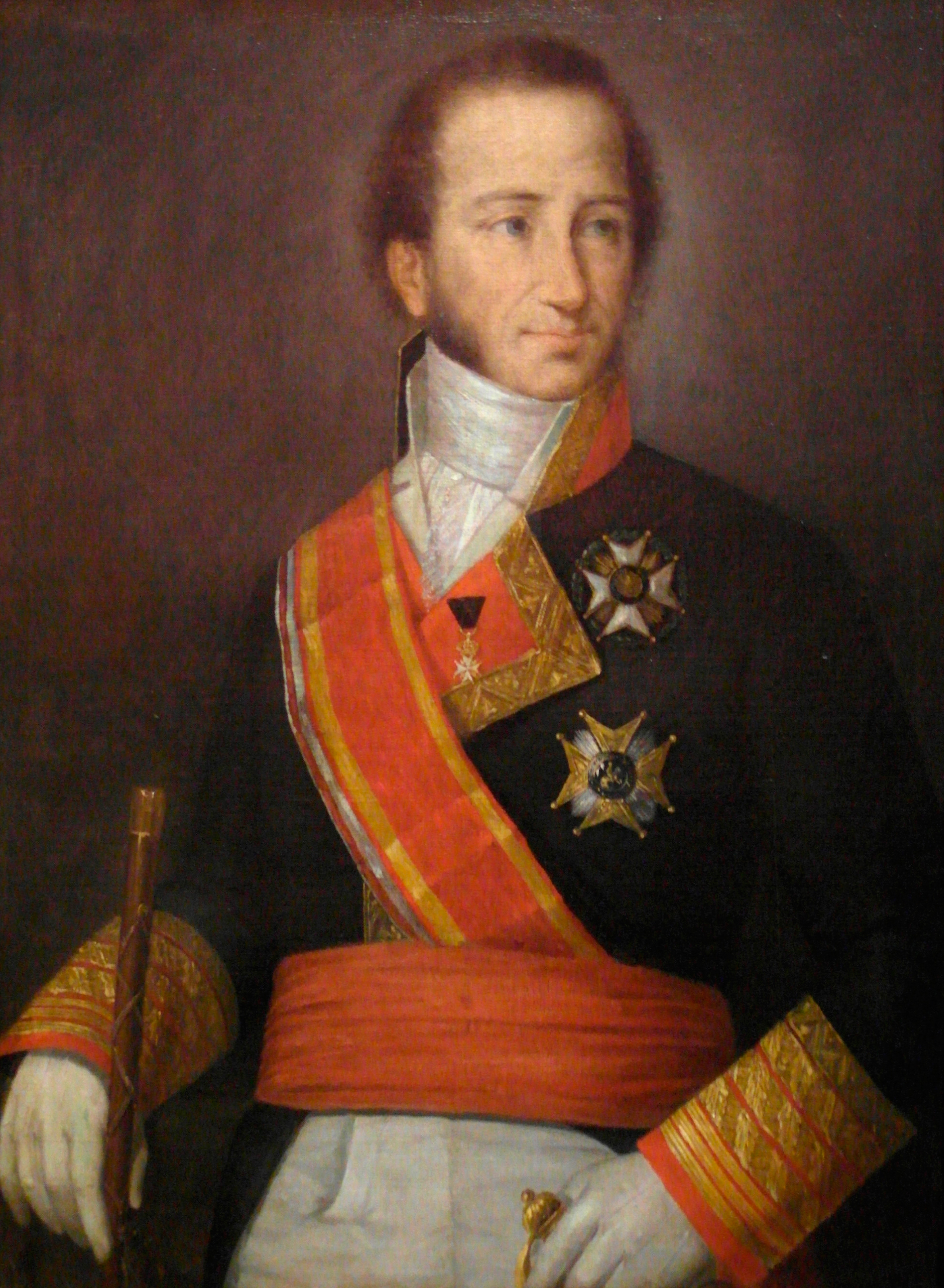 Retrato del marino español Cayetano Valdés (1767-1835), que llegó a ser el XVII capitán general de la Real Armada Española. En 1809 ascendió a teniente general y fue nombrado capitán general de Cádiz. El retrato fue realizado en Sevilla en 1847, por encargo del Museo Naval de Madrid, y el retratado aparece de medio cuerpo y de frente, vistiendo el uniforme pequeño de capitán general y de Director General de la Armada. Y luce las bandas y placas de las grandes cruces de las órdenes de San Fernando y de San Hermenegildo y la venera de caballero de la Orden de Malta. El cuadro ingresó en el Museo Naval de Madrid en 1847.